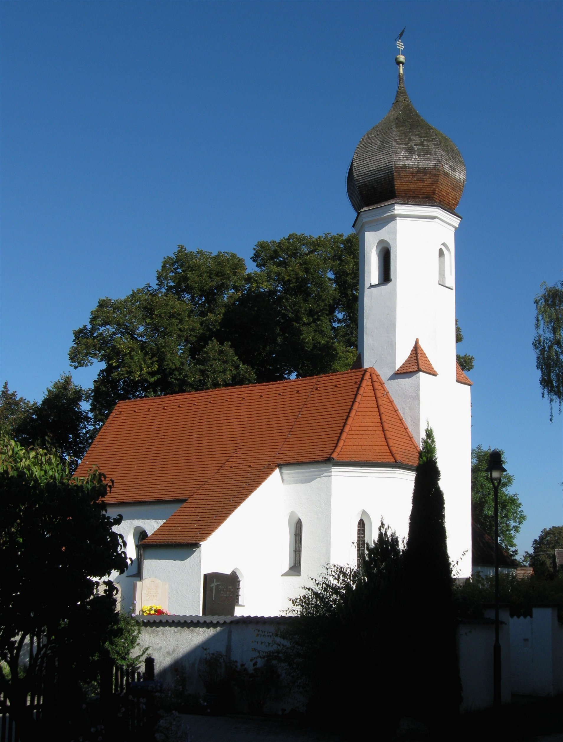 Englmeng 9. Kath. Filialkirche St. Johannes d. T., schlichter Saalbau mit stark eingezogenem Polygonalchor, angefügter Sakristei und nördlichem Flankenturm, Langhaus im Kern romanisch, Chor und Turm gotisch Anfang 14. Jh., Barockisierung und Zwiebelhaube 1689; mit Ausstattung.